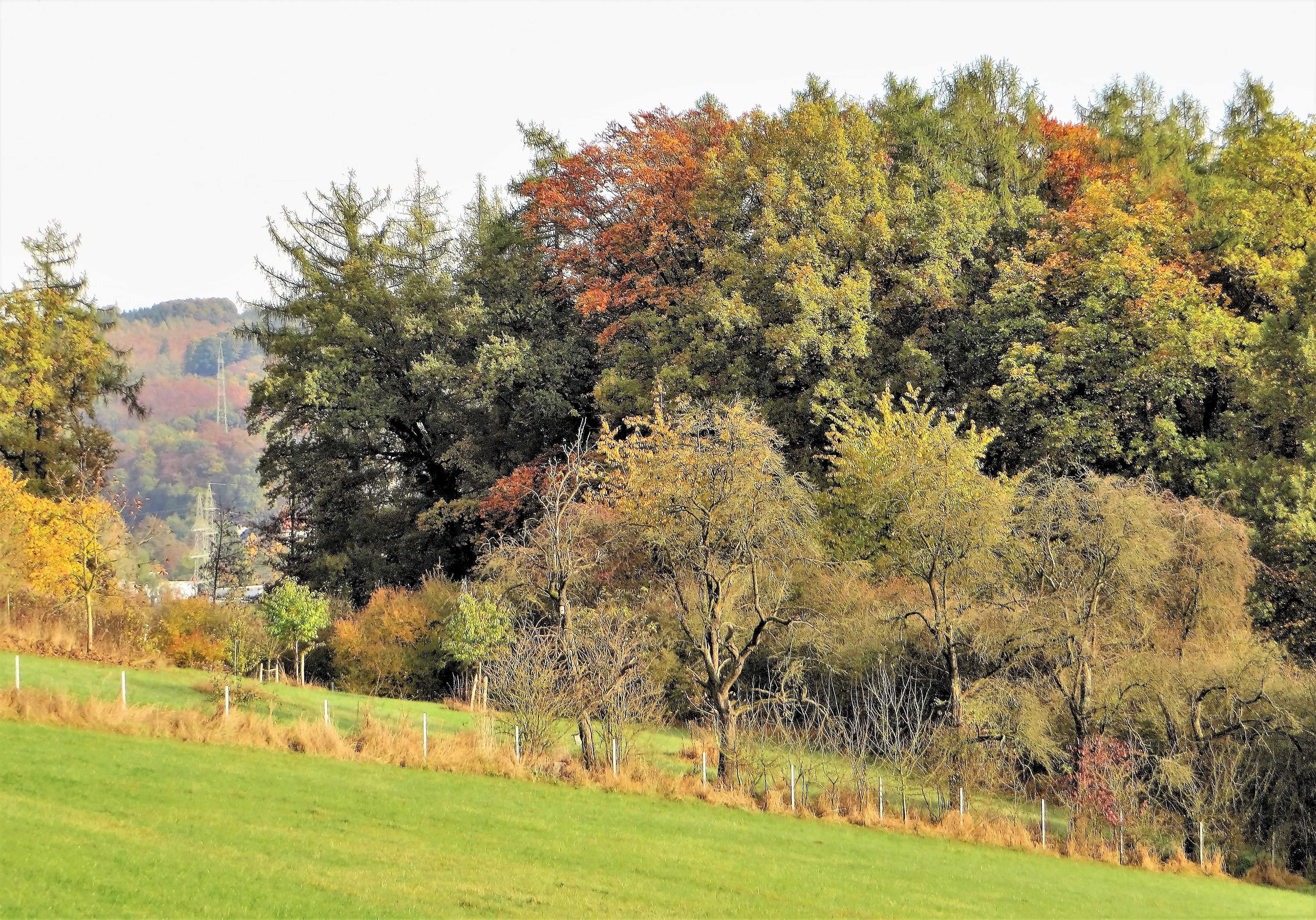 Geschützter Landschaftsbestandteil „Feldhecke Tüßfeld“ in Hagen, Hohenlimburger Straße (Höhe Nr. 84). Es handelt sich um eine ca. 85 m lange und 6 m breite Feldhecke überwiegend aus Weißdorn und Schwarzem Holunder sowie um eine Baumreihe aus 10 Obstgehölzen entlang einer hofnahen Wiese südlich der Hohenlimburger Straße. Auf dem abgebildeten Bereich befindet sich die Hecke unterhalb der Wiese, vor dem hohen Baumbestand (Teil des Naturschutzgebietes „Weißenstein“).